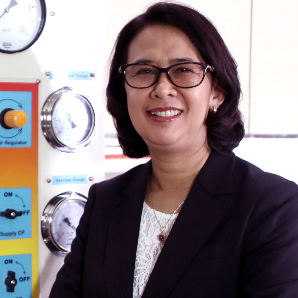 Rektor sekaligus Dosen di Universitas Bakrie